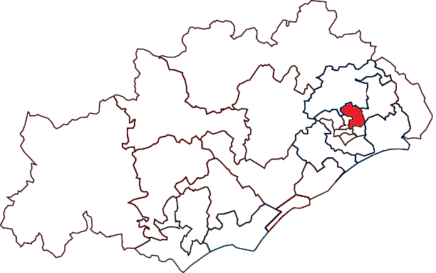 Situation du canton dans le département de l'Hérault